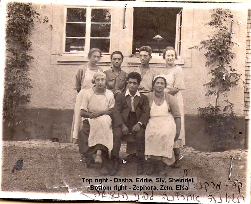 Der Markenhof war ein Hachschara-Lehrgut. Seine Absolventen gründeten in Palästina den Kibbuz Beth Sera (Beit Zera)